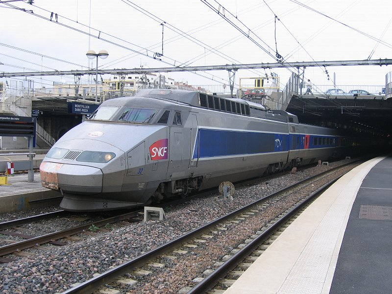 TGV reliant Dijon à Bordeaux ici en gare de Montpellier Saint Roch